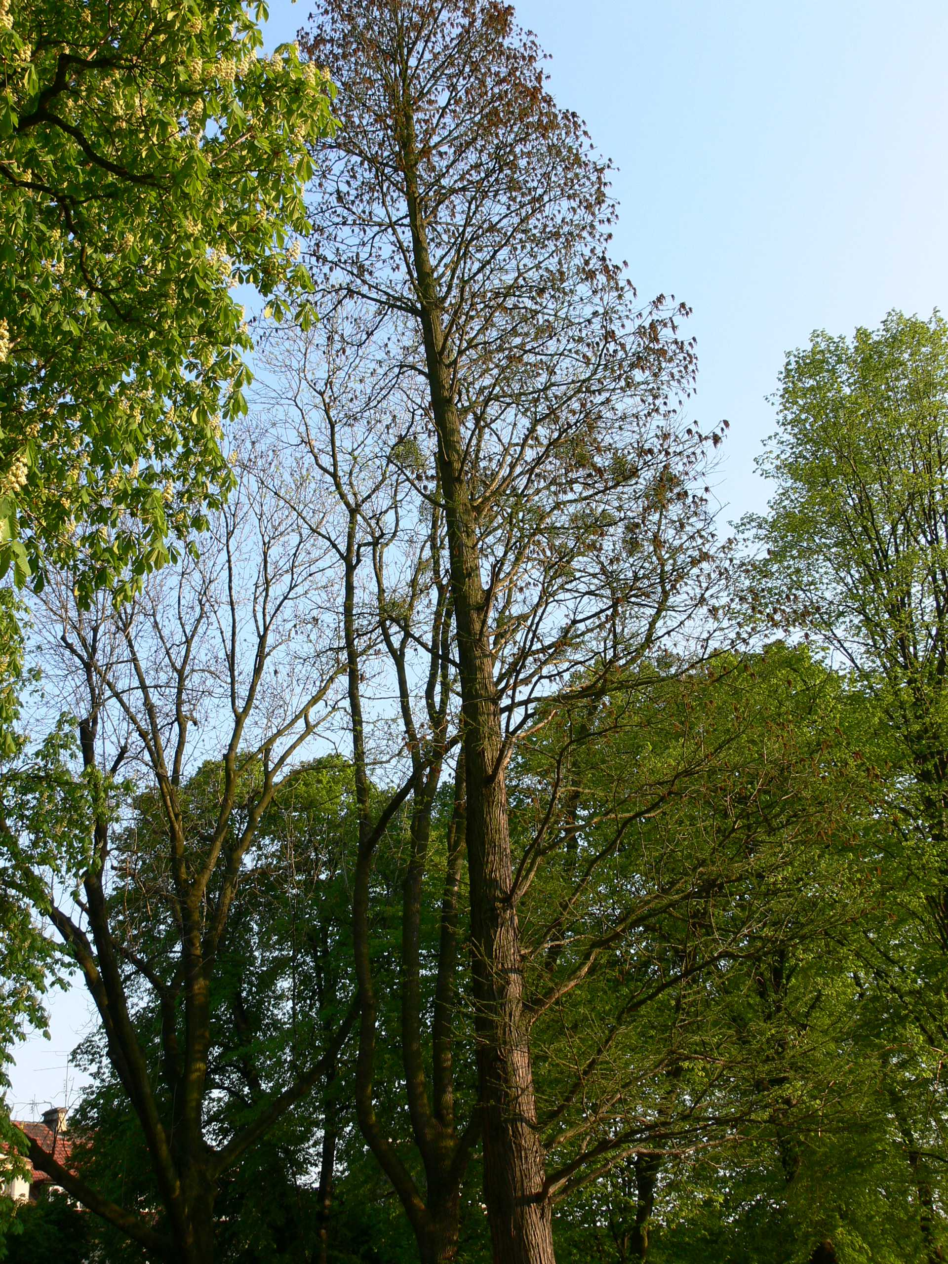 Racibórz — Park im. Miasta Roth: pomnik przyrody, cypryśnik błotny